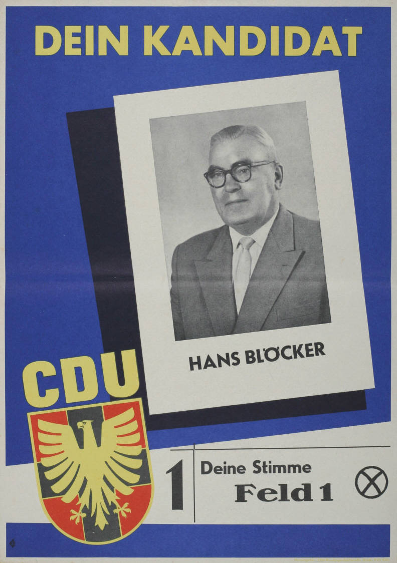 Dein Kandidat Deine Stimme Feld 1 Abbildung: Porträtfoto Plakatart: Kandidaten-/Personenplakat mit Porträt Auftraggeber: CDU-Bundesgeschäftsstelle Drucker_Druckart_Druckort: KVD, Köln Objekt-Signatur: 10-001: 819 Bestand: Plakate zu Bundestagswahlen (10-001) GliederungBestand10-18: Plakate zu Bundestagswahlen (10-001) » Die 3. Bundestagswahl am 15. September 1957 » CDU » Mit Porträtfoto Lizenz: KAS/ACDP 10-001: 819 CC-BY-SA 3.0 DE